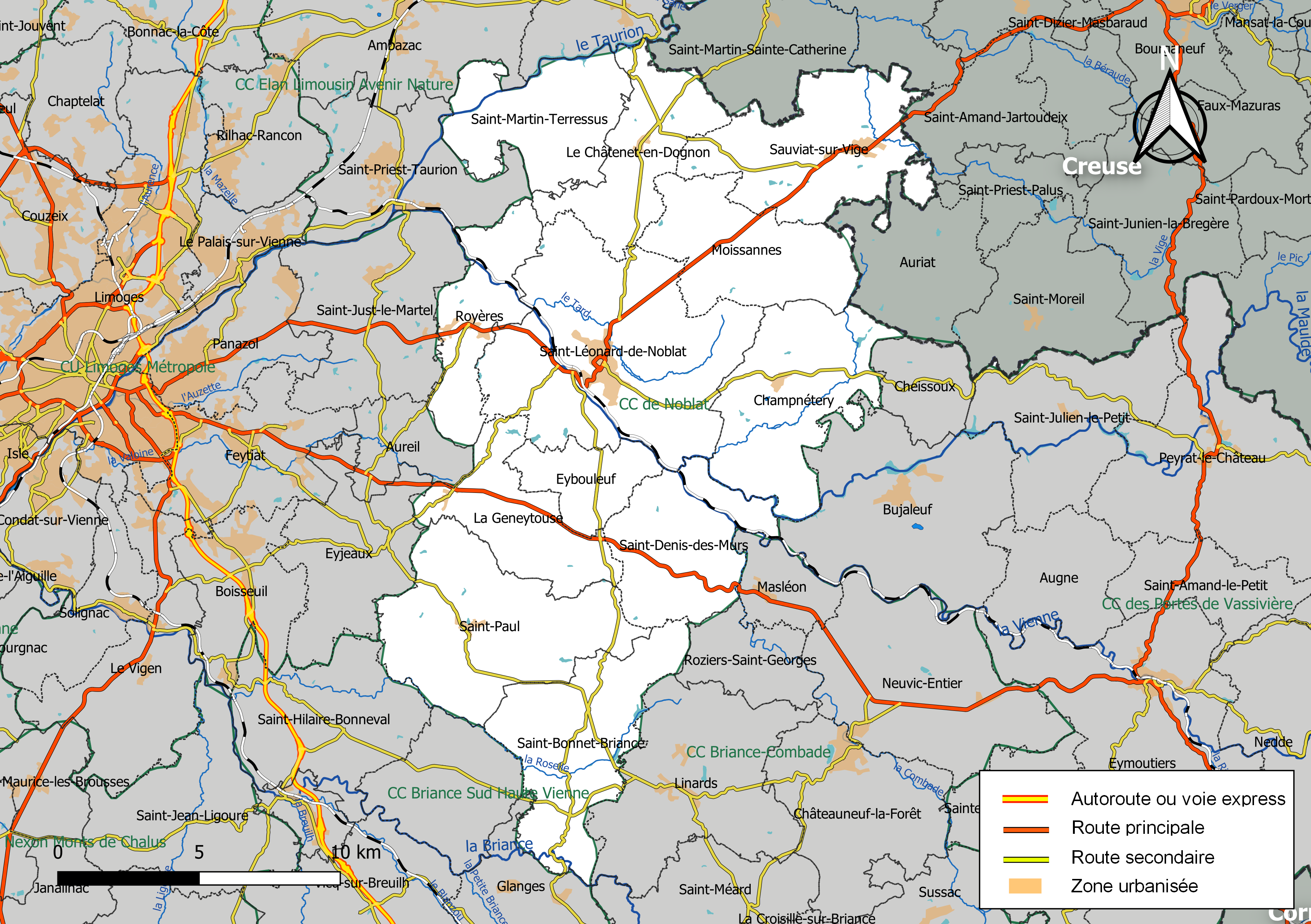 Carte géographique de la Communauté de communes de Noblat, département de la Haute-Vienne, France. Composition au 1er janvier 2019.